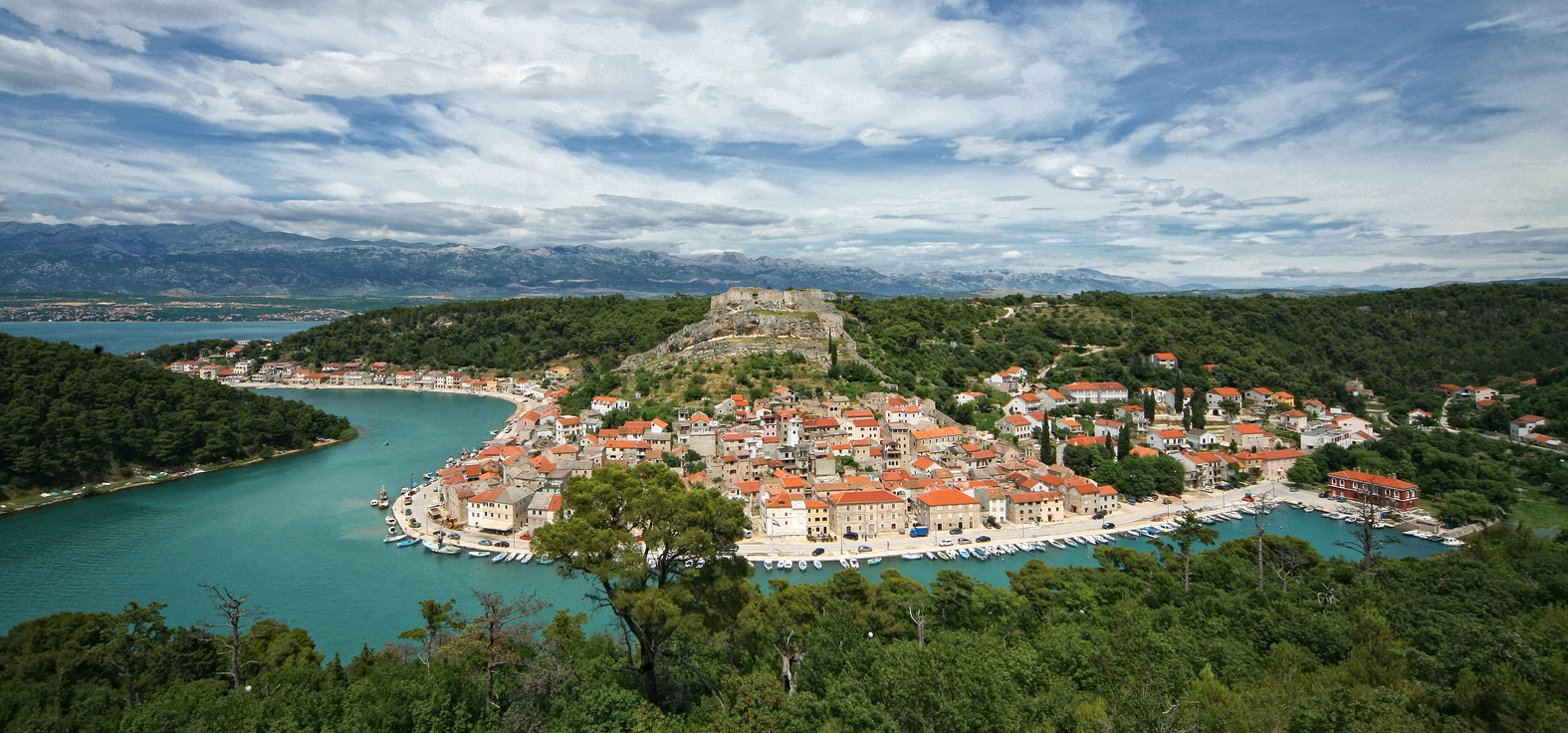 Fotografija Panorama Novigrada